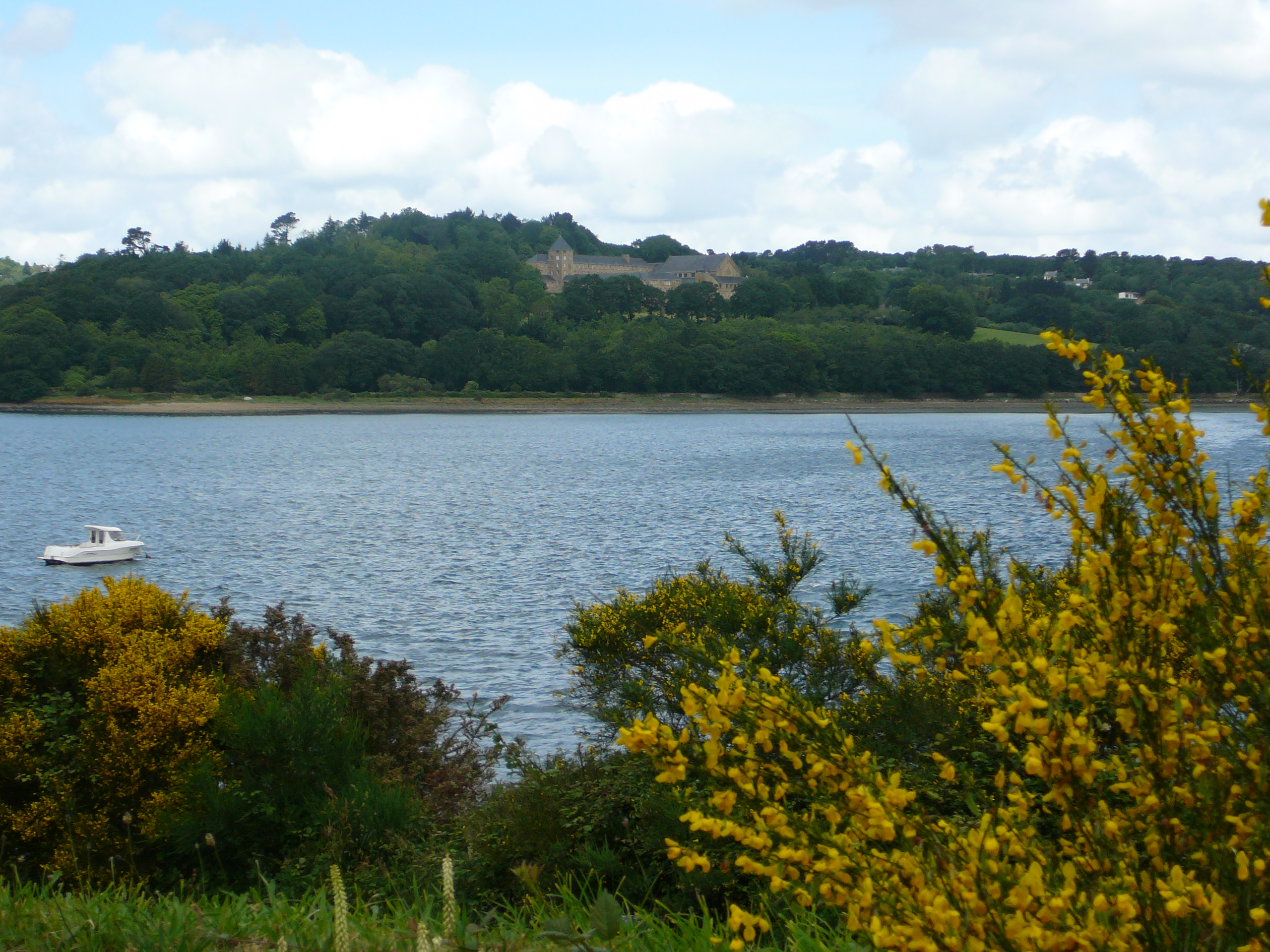 L'Aulne et l'abbaye actuelle de Landévennec